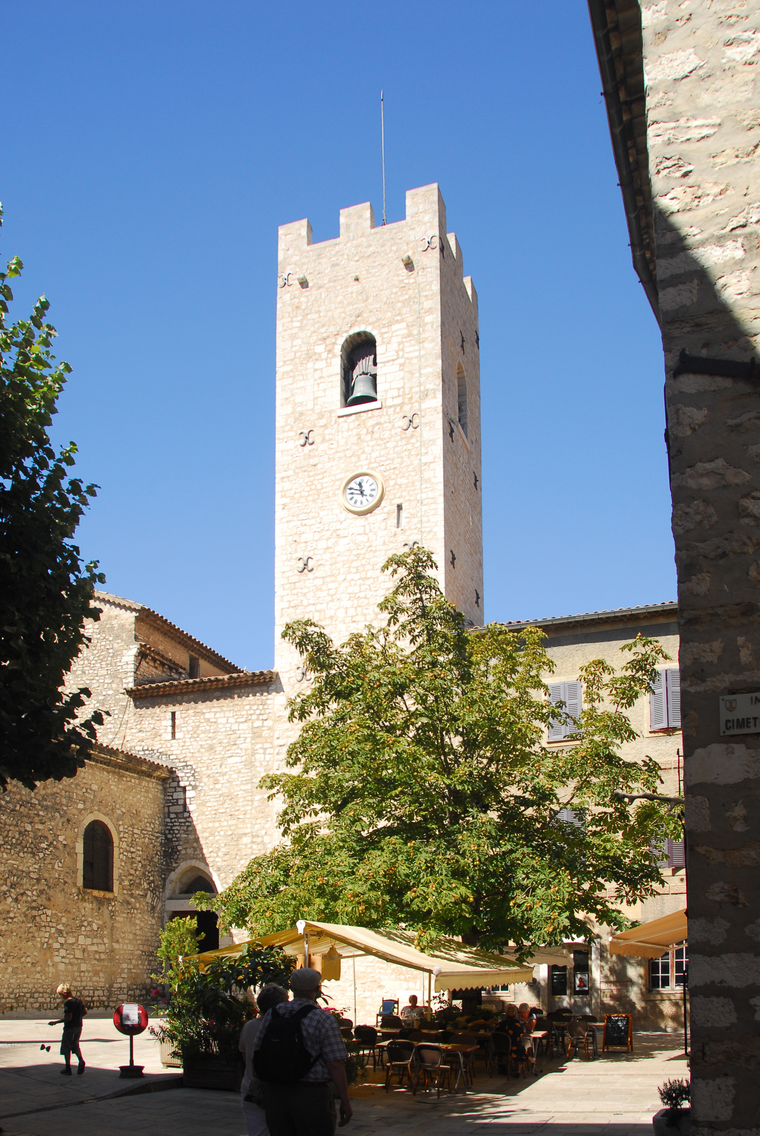 Kathedrale von Vence, Glockenturm von NO